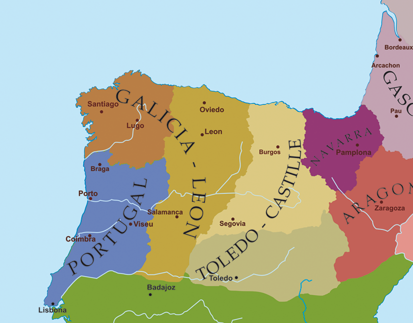 Mapa político do noroeste da Península Ibérica a finais do século XII.